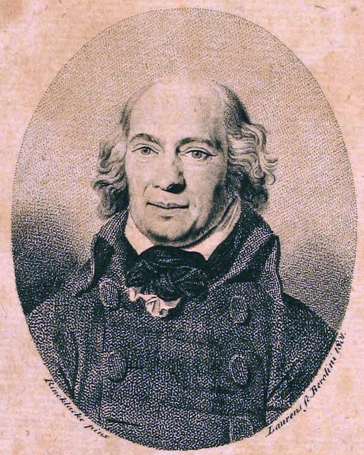 Bild (Ausschnitt) des Archivars Nikolaus Kindlinger